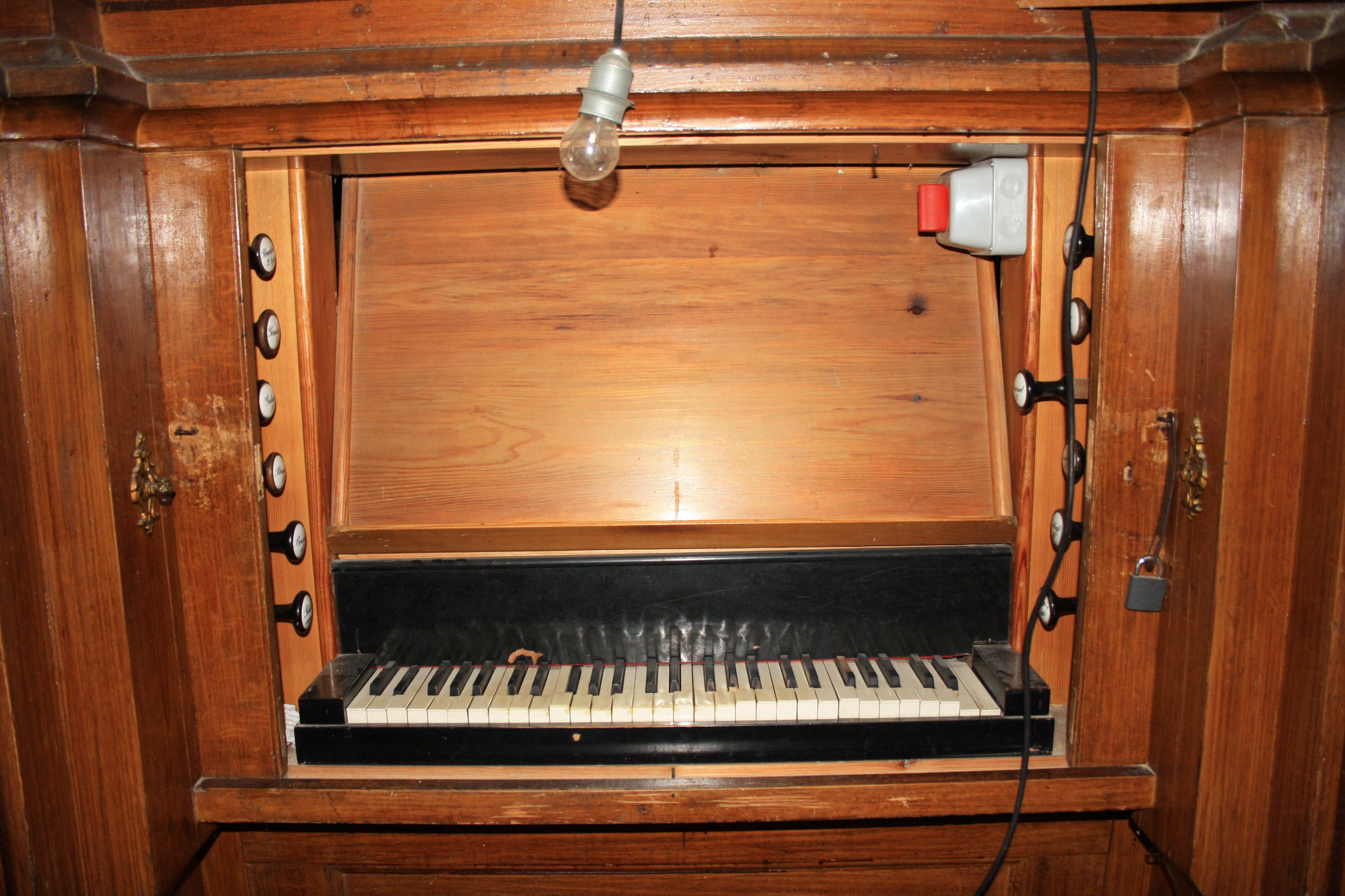 Stół gry - Rusinowo